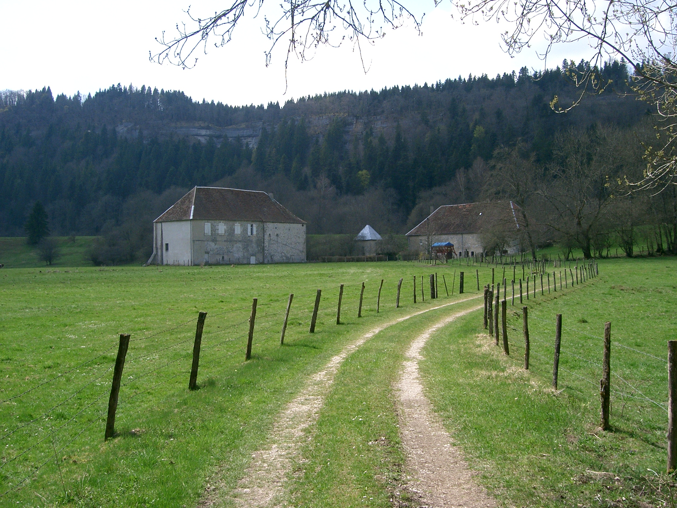 Bâtiments actuels à l'emplacement de l'ancienne abbaye de Balerne (Jura - France)